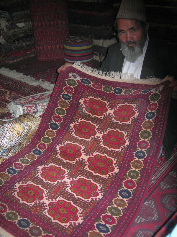 Carpet seller in Kabul, Afghanistan